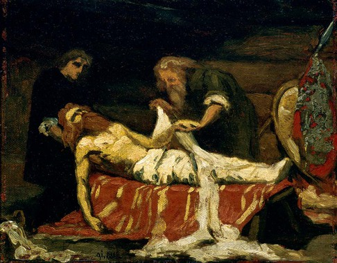 Norwegian: Olav den helliges lik pleies.title QS:P1476,no:"Olav den helliges lik pleies." label QS:Lno,"Olav den helliges lik pleies."